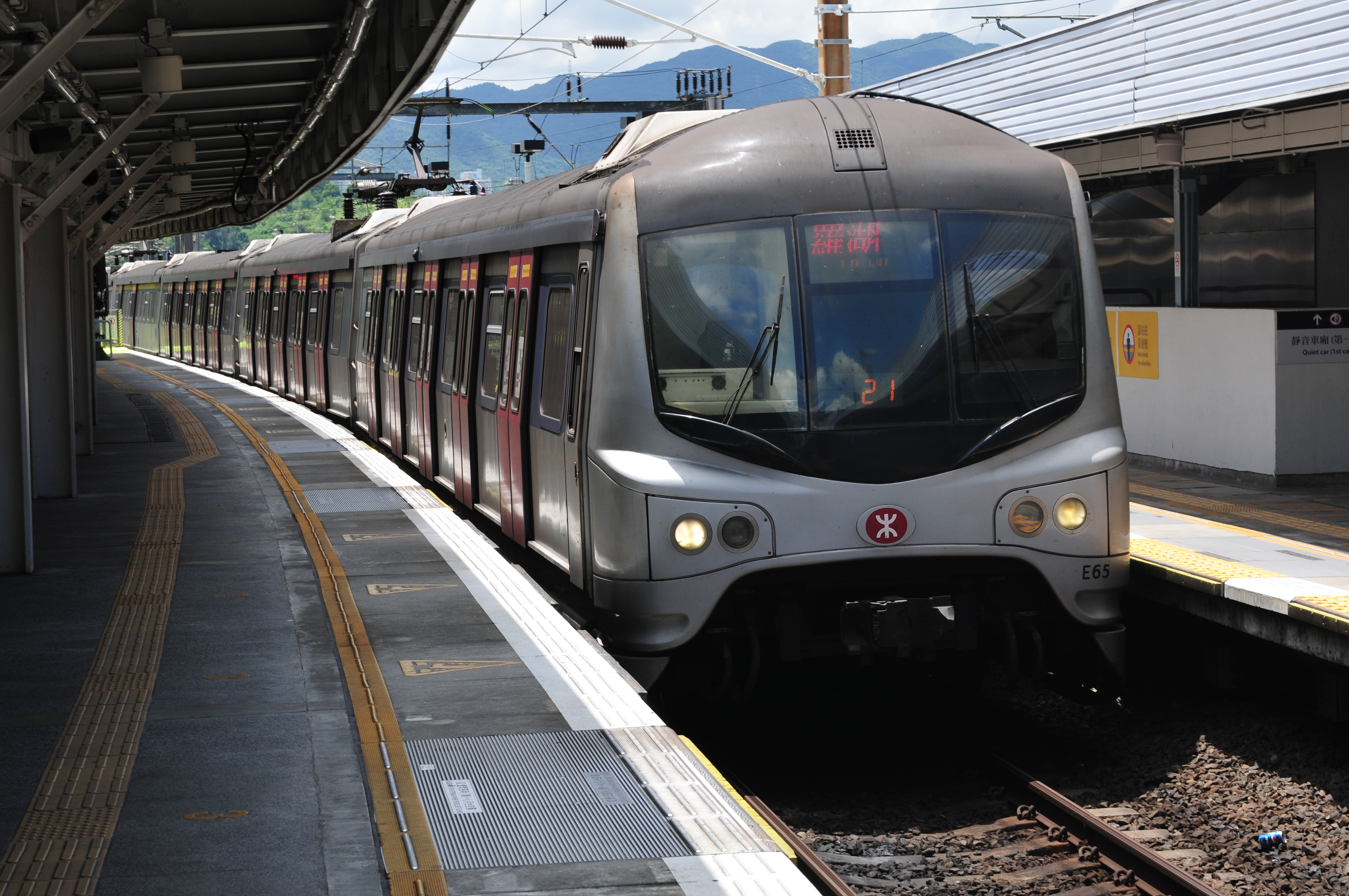 Wikimania 2013 Hongkong